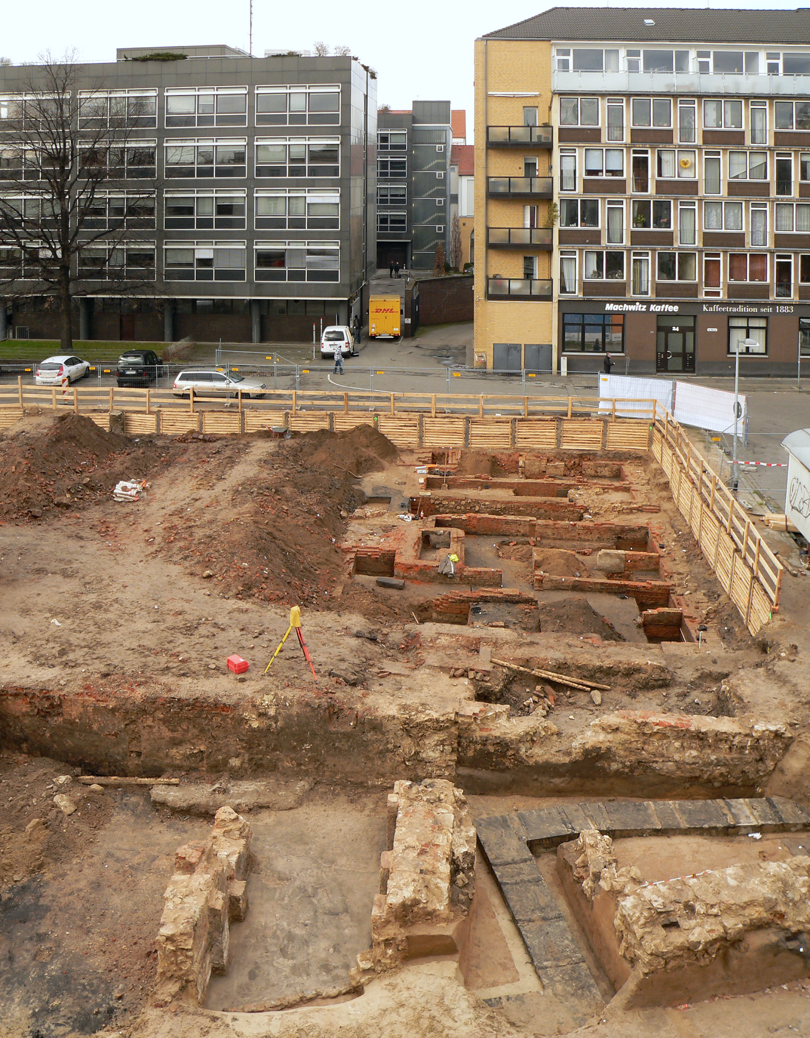 Ausgrabungsfläche auf dem Marstallplatz im westlichen Bereich